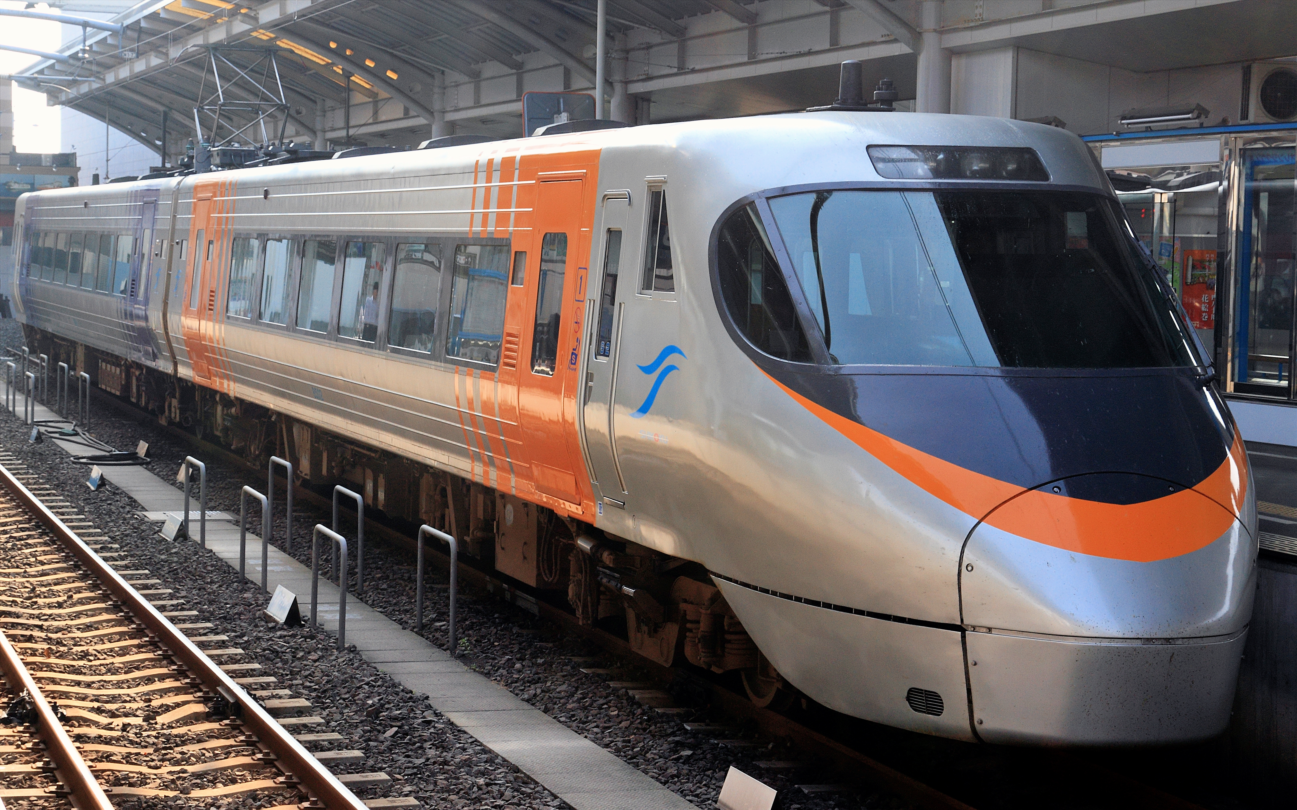 JR四国 8000系特急形電車 特急「いしづち5号」 8502+8202